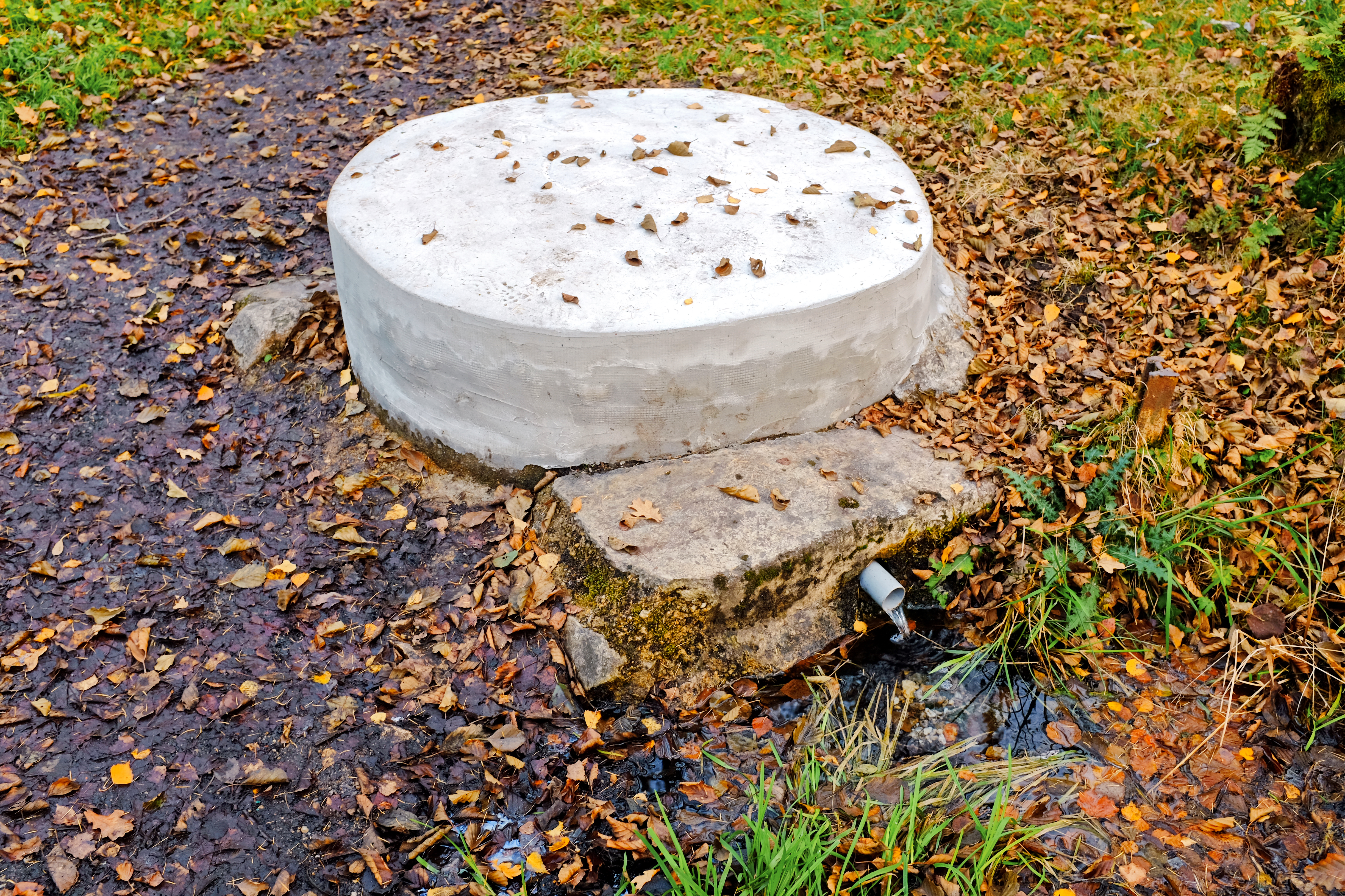 Pochlovická minerálka, Dolní Pochlovice, okres Sokolov